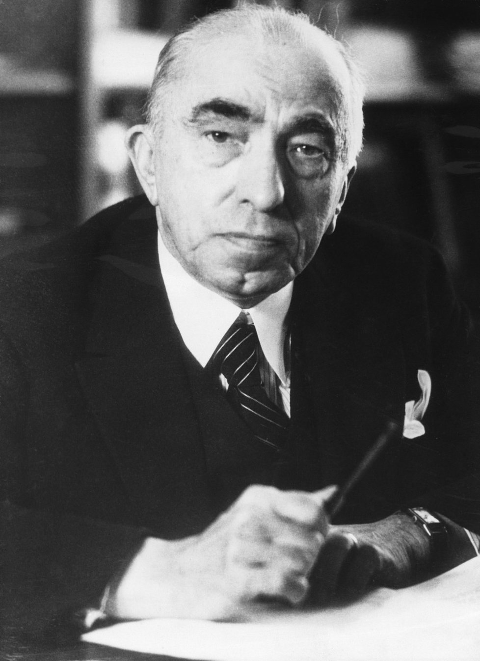 Эмиль Гаха (1872—1945)